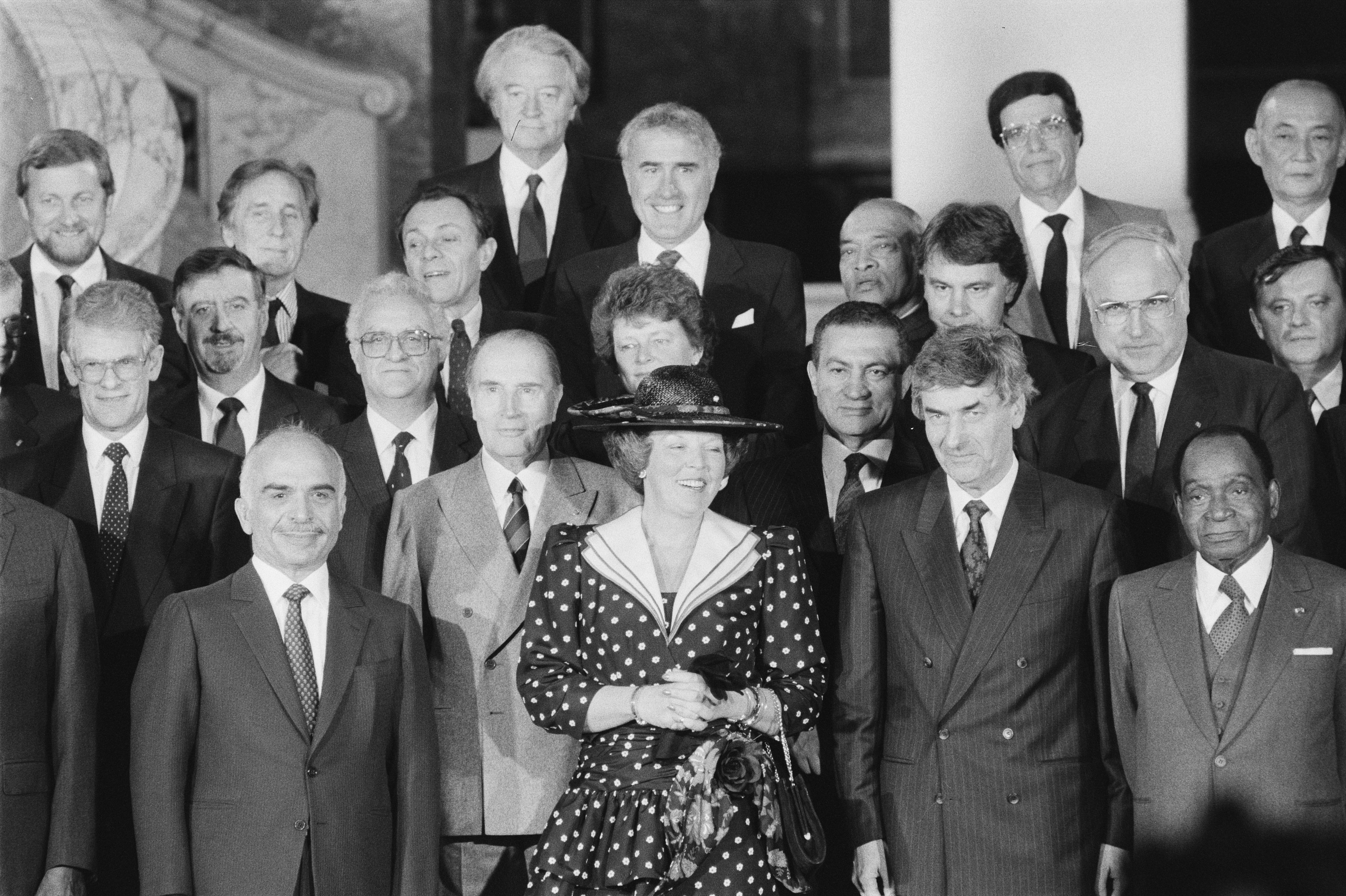 Collectie / Archief : Fotocollectie Anefo Reportage / Serie : Internationale milieuconferentie in het Vredespaleis te Den Haag Beschrijving : Groepsfoto met Koningin Beatrix en premier Lubbers (r) Datum : 11 maart 1989 Locatie : Den Haag, Zuid-Holland Trefwoorden : milieuconferenties Fotograaf : Croes, Rob C. / Anefo Auteursrechthebbende : Nationaal Archief Materiaalsoort : Negatief (zwart/wit) Nummer archiefinventaris : bekijk toegang 2.24.01.05 Bestanddeelnummer : 934-4200